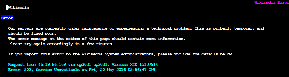 תקלה בשרתי ויקימדיה